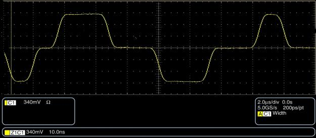 Tektronix Oszillogramm mit 100-Base TX Signal